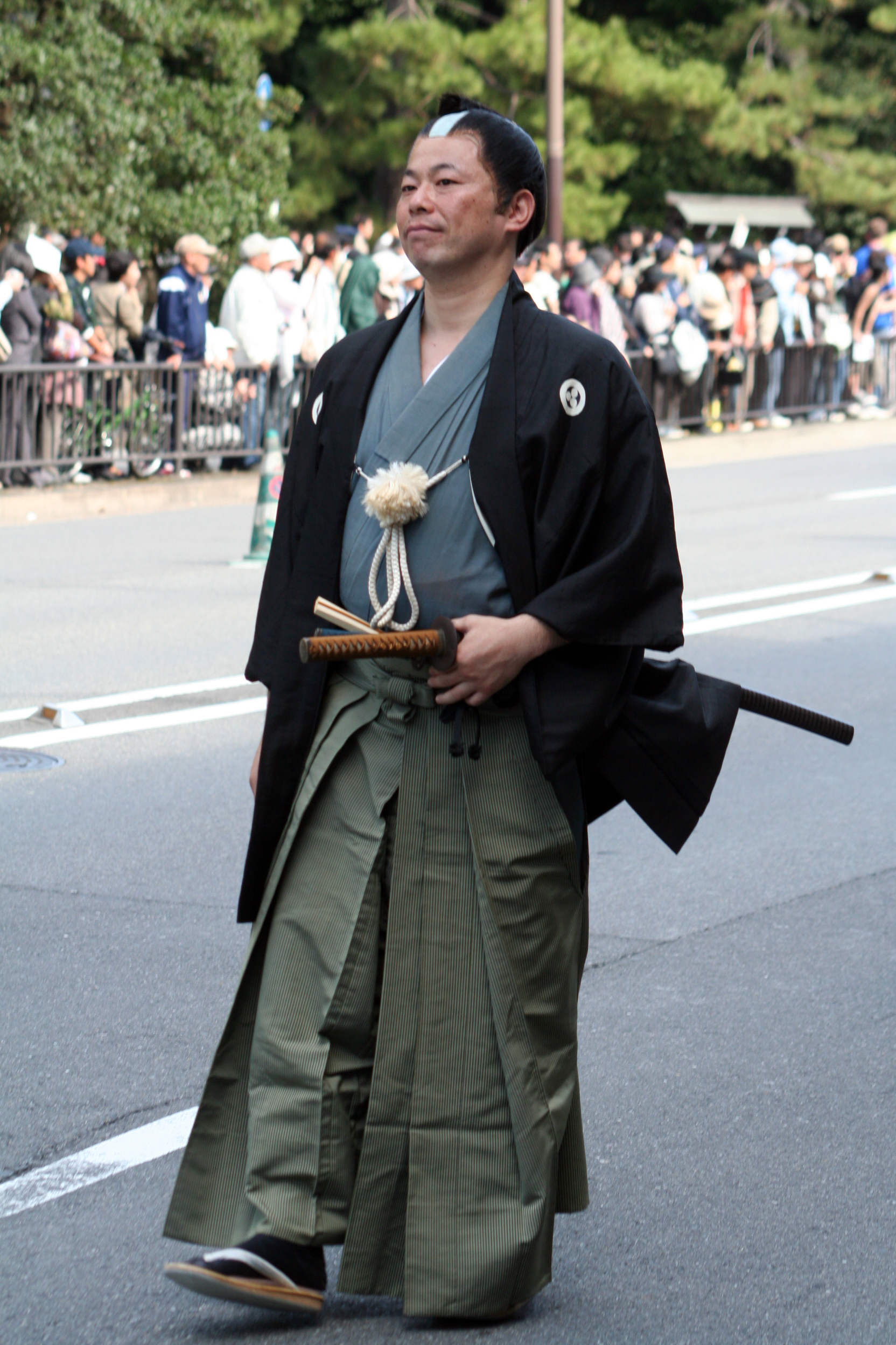 京都府京都市にて開催された時代祭。正午の御所から平安神宮までの行進の様子。2009年10月22日撮影。